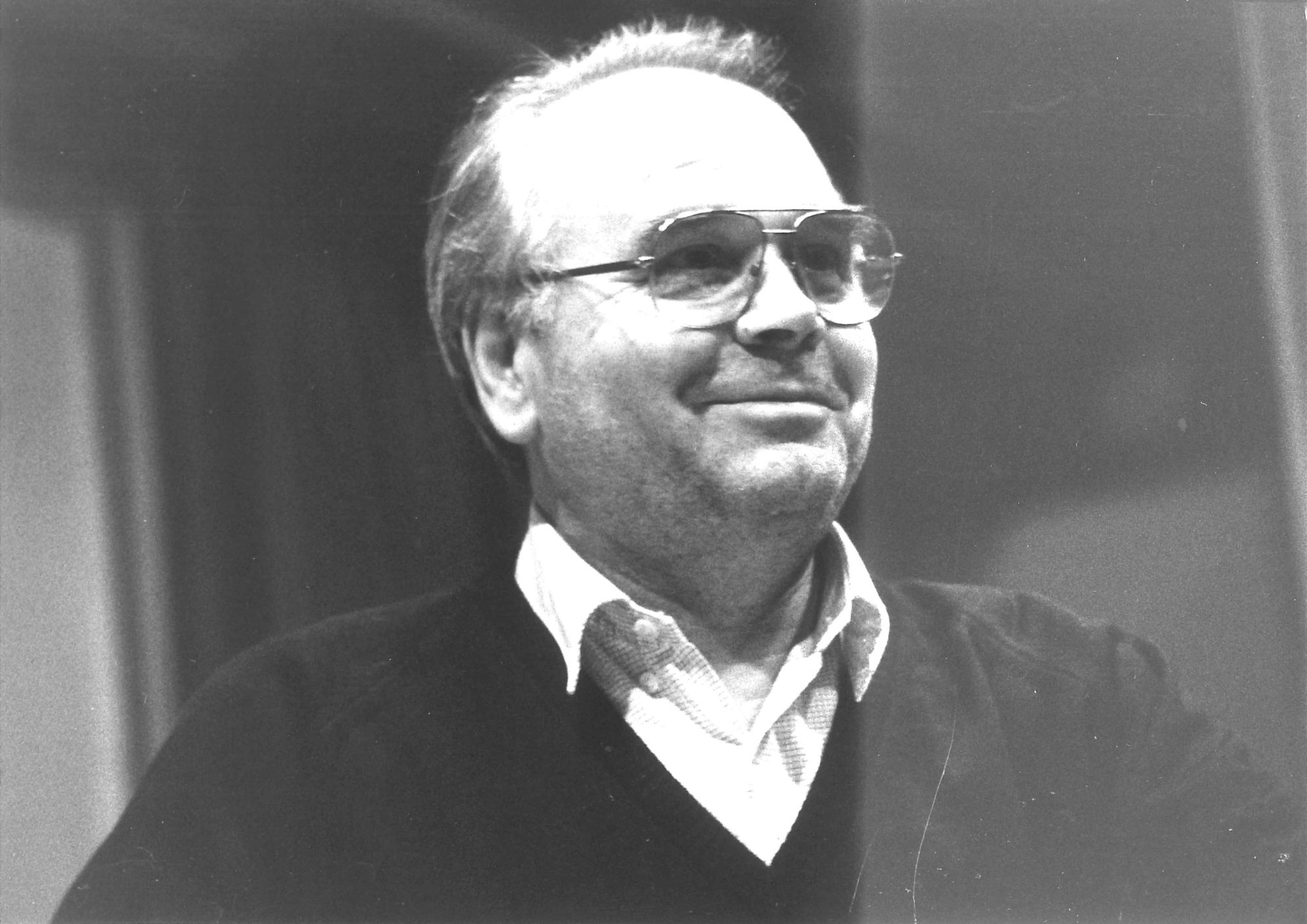 Der Schauspieler Edwin Marian im Hörspielstudio, Porträtaufnahme: Werner Bethsold